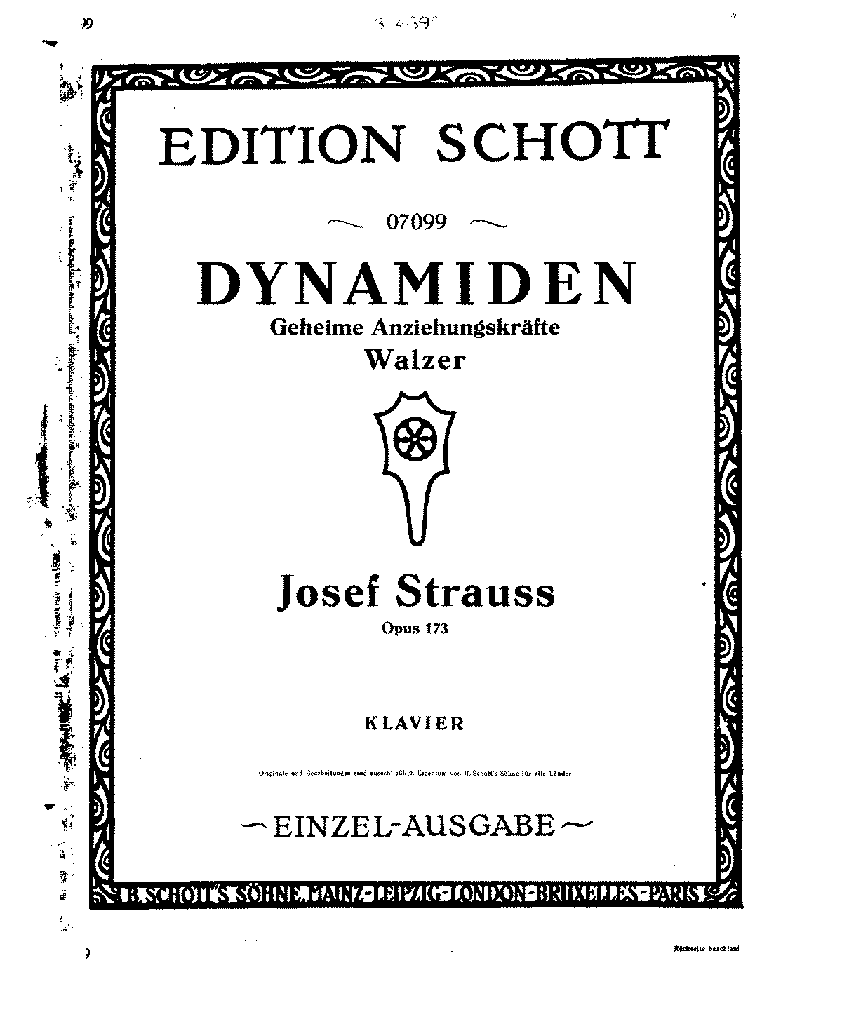 ワルツ『Dynamiden』ピアノ譜の表紙絵